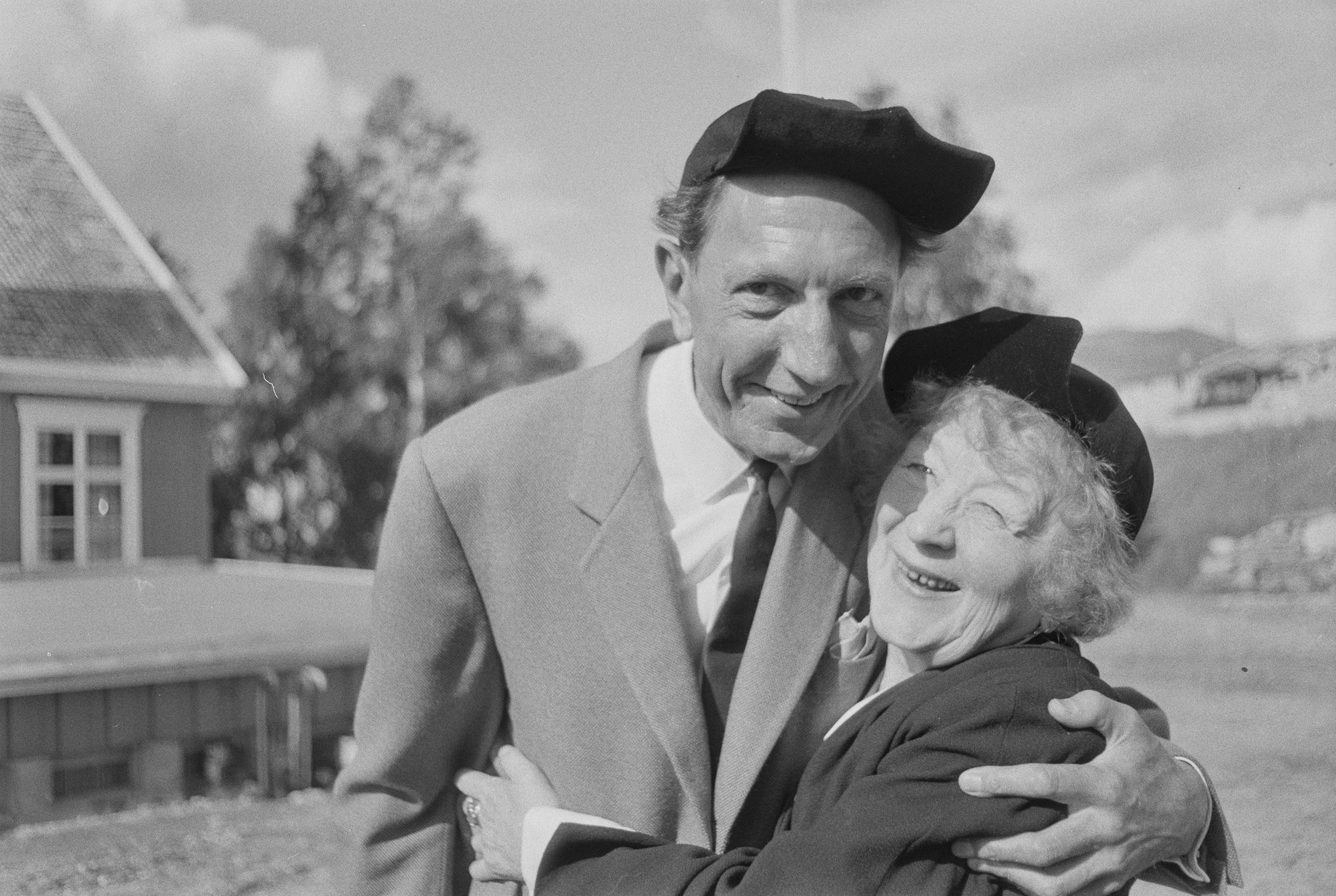 Bildet er hentet fra Arkivverket. Foto tatt i forbindelse med reportasje om den norske filmen Freske fraspark fra 1963. Manus var ved Kjell Aukrust og Bjørn Breigutu. Regi ved Bjørn Breigutu. Kjell Aukrust, Leif Juster, Turid Caldwell, Alfhild Hovdan, Per Bistrup, Lalla Carlsen Arkivinstitusjon : Riksarkivet Arkivnavn : Billedbladet NÅ Sted : Norge, Hedmark, Alvdal, Emneord: Film, Filminnspilling Avbildet: Juster, Leif; Carlsen, Lalla